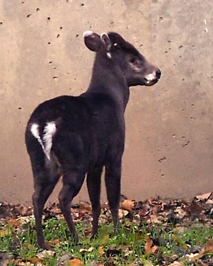 Ostchinesischer Schopfhirsch (Elaphodus cephalophus michianus) im Tierpark Berlin